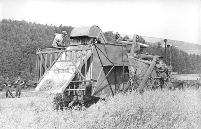 Zwinge, Getreideernte mit Mähdrescher, Hafer Zentralbild Wittig-TBD Str.-Kr. 19.8.1953. Ernte an der Demarkationslinie. In der Flur Zwinge, Kreis Worbis, ist durch Grenzbegradigung auch ein 8 ha großes Feld in Besitz der Gemeinde Zwinge übergegangen. Die werktätigen Einzelbauern von Zwinge bearbeiten diesen Acker gemeinsam und hatten ihn in diesem Jahre mit Hafer bestellt. UBz: Hart an der Demarkationslinie arbeitet der Mähdrescherführer Franz Katkowski von der MTS Teistungen mit seinem "Stalinez 4". Interessiert schauen westdeutsche Grenzpolizisten über die Demarkationslinie hinwg zu, wie der uns durch die großzügige Hilfe der Sowjetunion gelieferte "Stalinez 4" arbeitet.